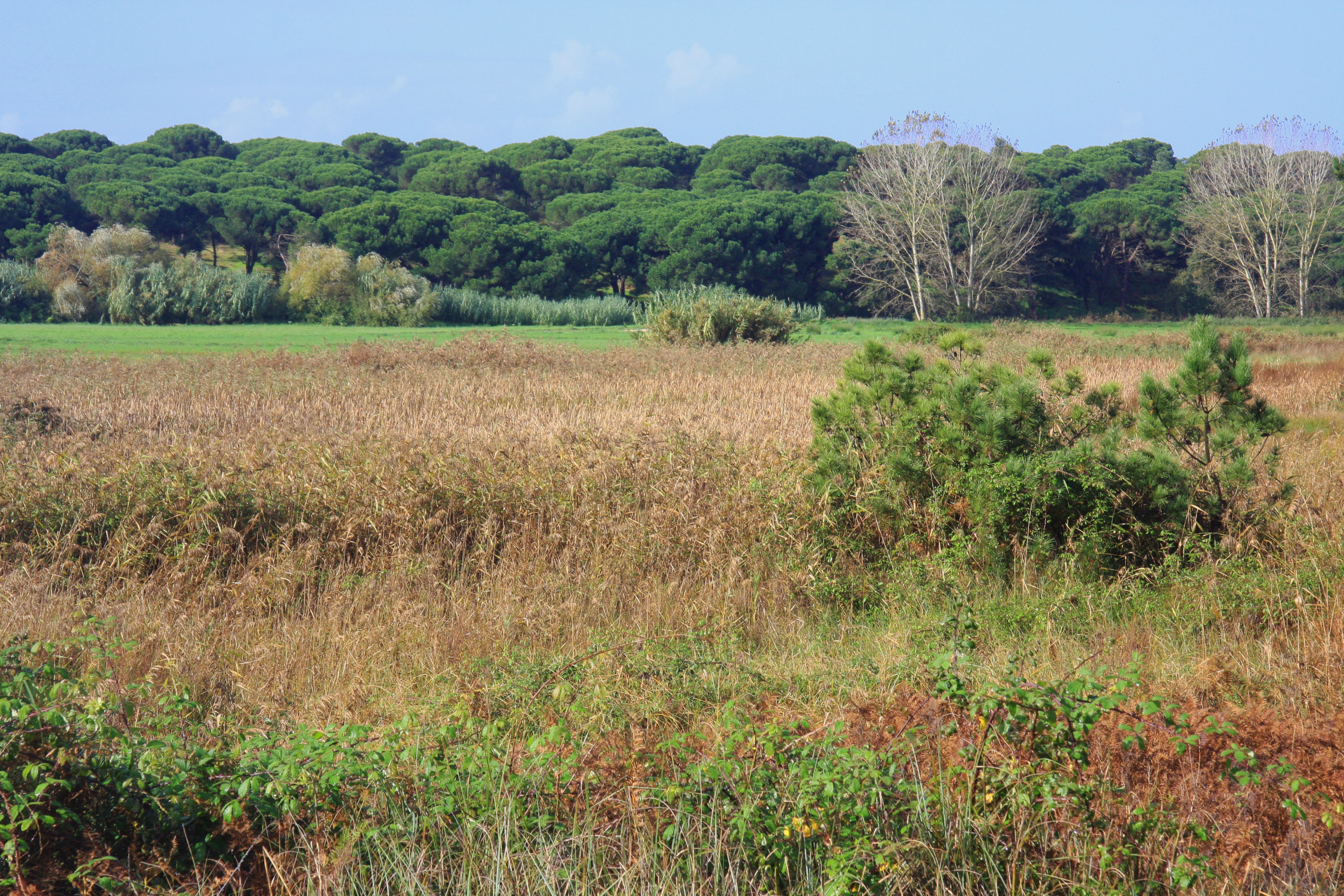 Obszar chroniony da Arrábida